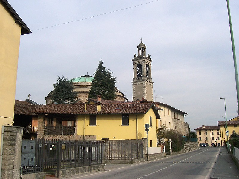 Ghisalba - Via Ghidini